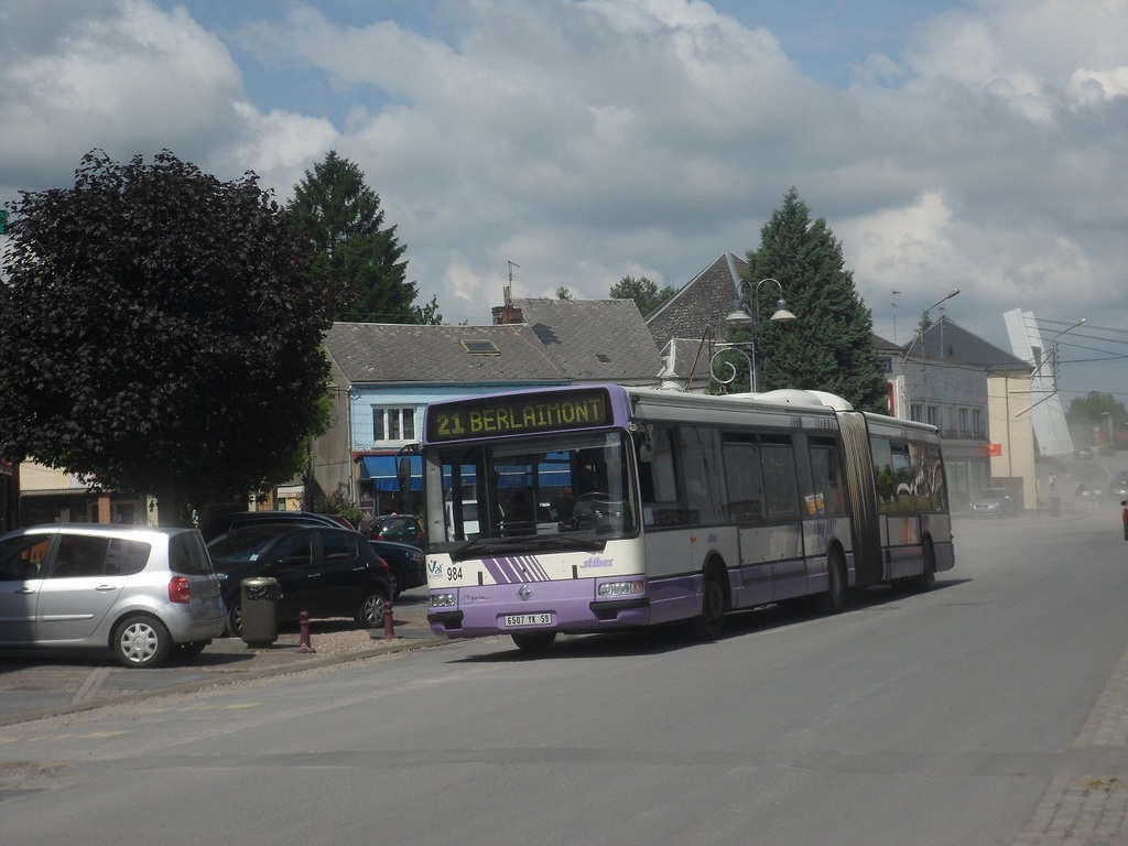 Renault Agora L n°984 du réseau Stibus de Maubeuge, à l'arrêt Gare SNCF.